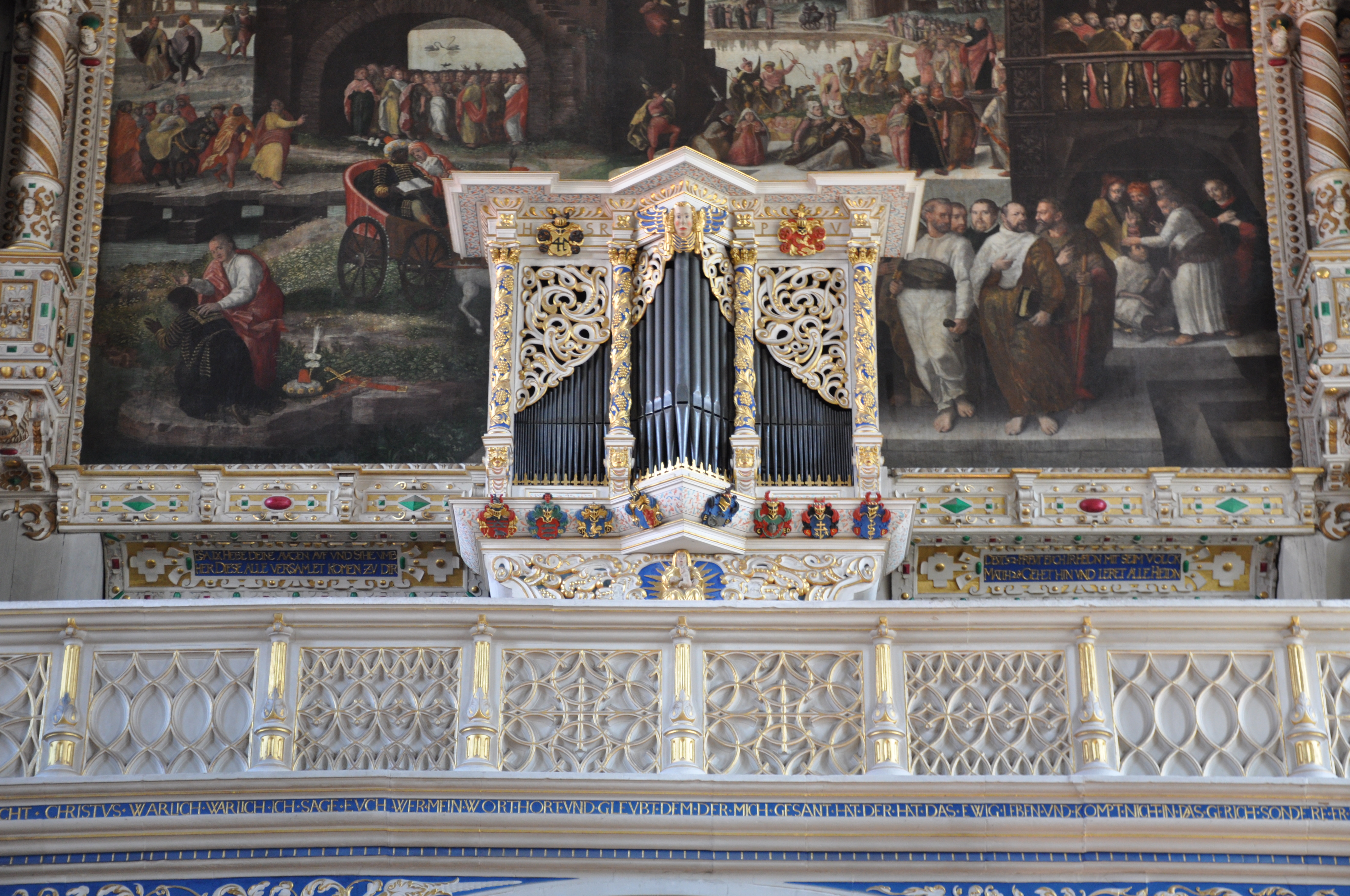 Halle (Saale), Marktkirche